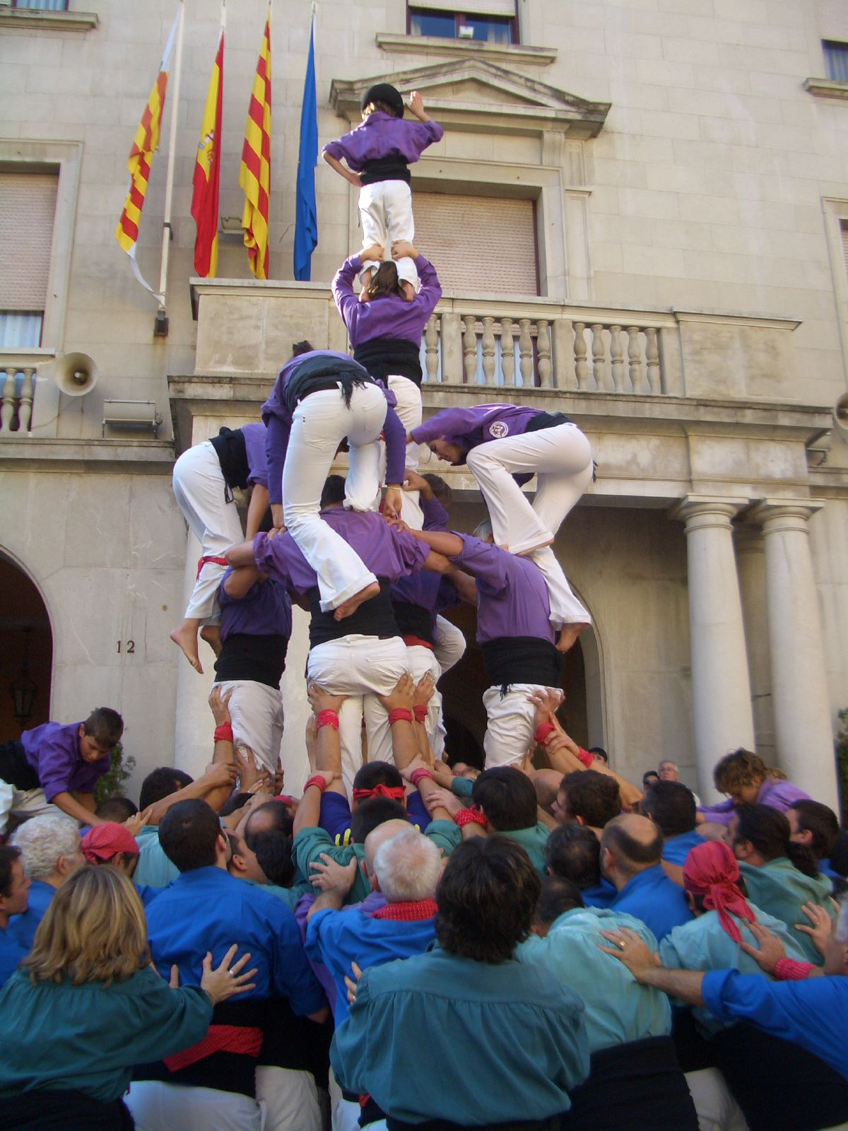 4 de 6 amb agulla (deixant un pilar de 4 al centre) de la Colla Castellera de Figueres, en la 11 Diada de la colla, a la ciutat de Figueres.